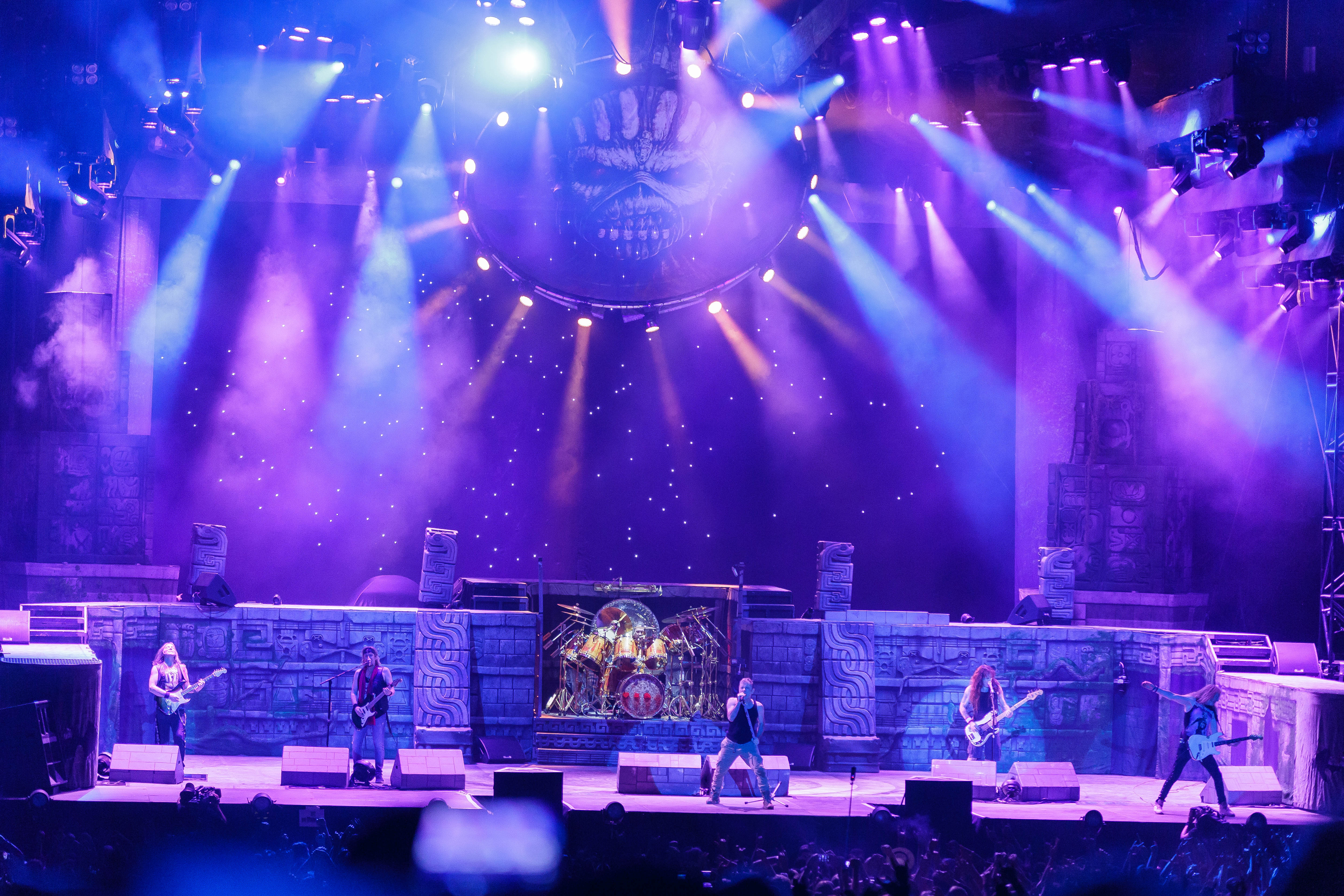 Paléo Festival Nyon, édition 2016, 19-24 juillet 2016. Mercredi 20: Iron Maiden (heavy-metal, Grande-Bretagne)